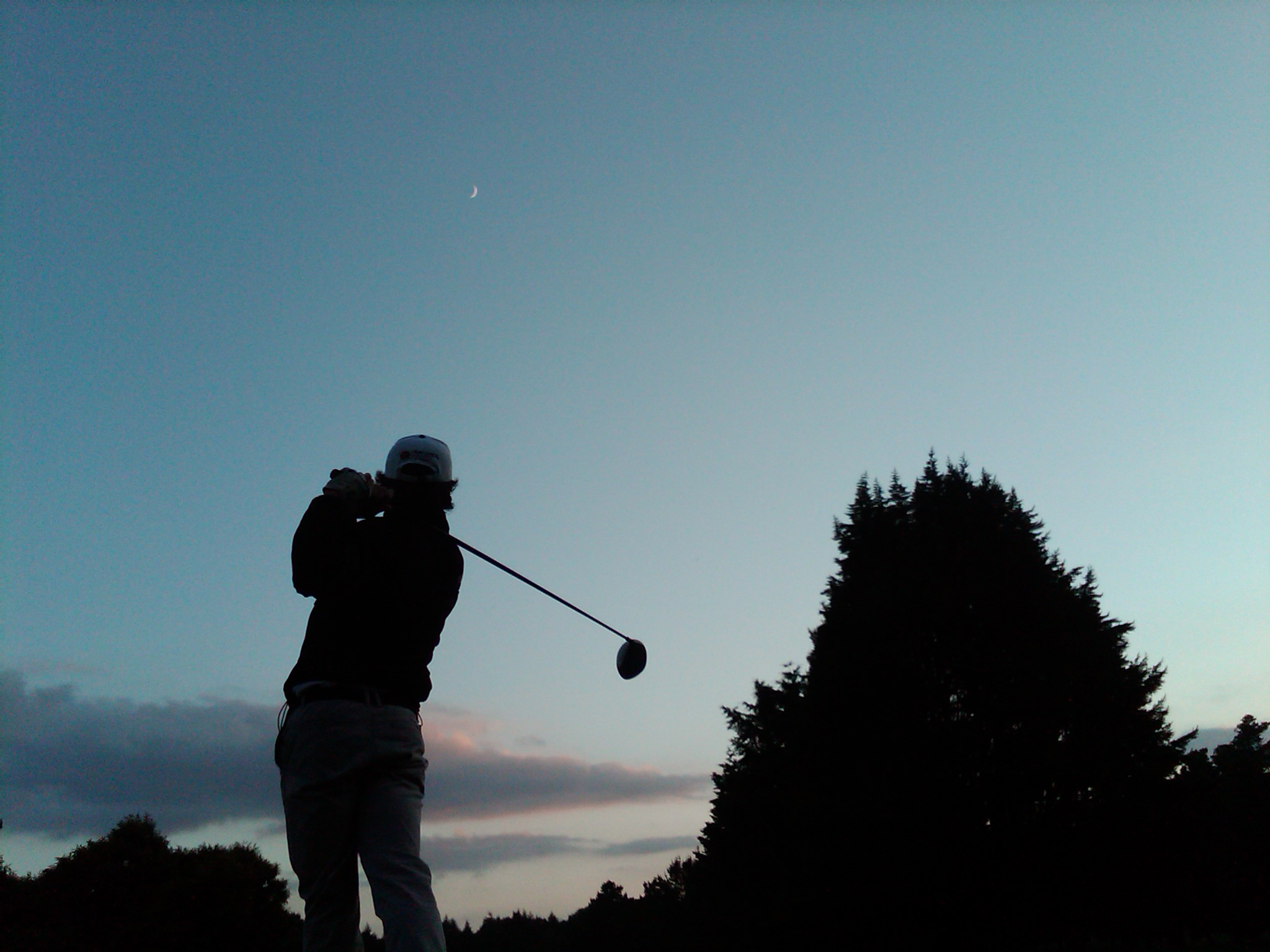 Golf e solpor no RCG A Coruña (A Zapateira)